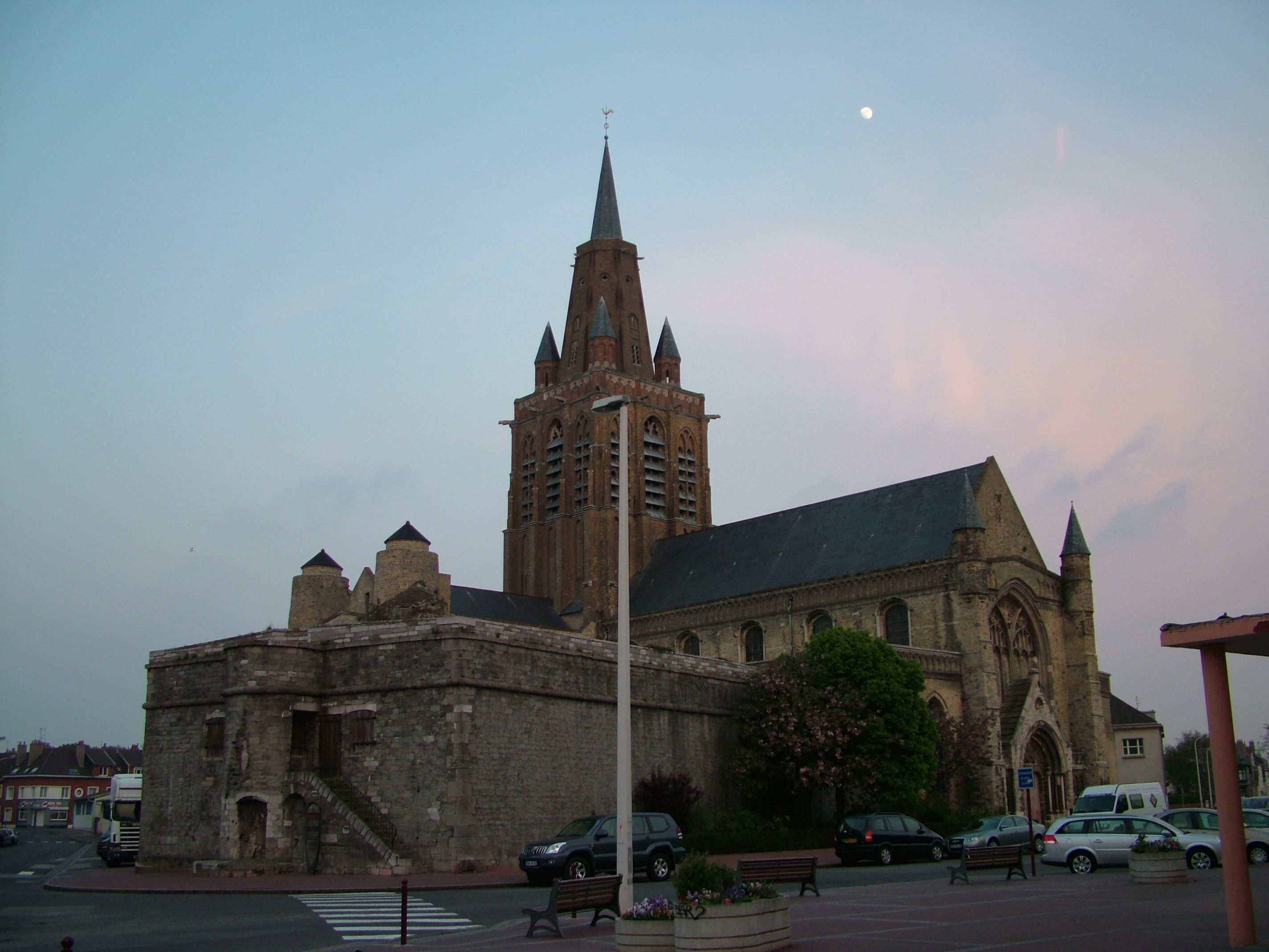 Die Kirche Notre Dame in Calais in Frankreich